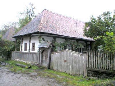 Sóváradi parasztház, Erdély